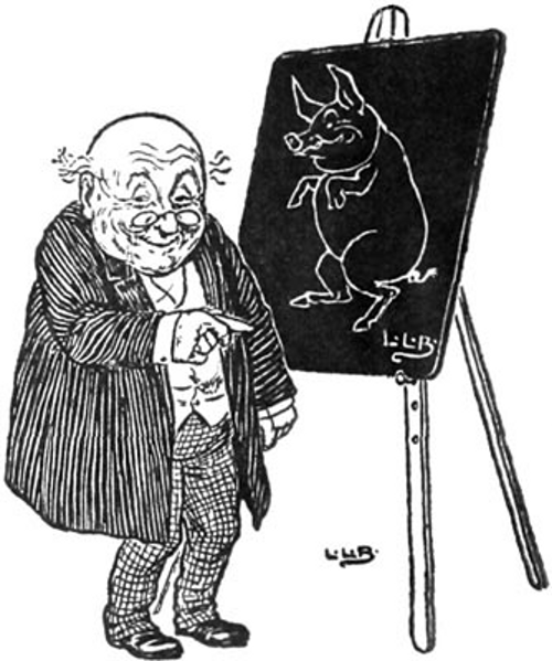 Signature de L. L. Brooke, album de comptines.